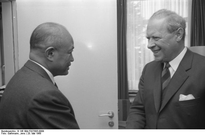 Besuch des Generalstabschefs von Madagaskar, General Gabriel Ramanantsoa bei VLR I. Graf Posadowski-Wehner im AA Bonn